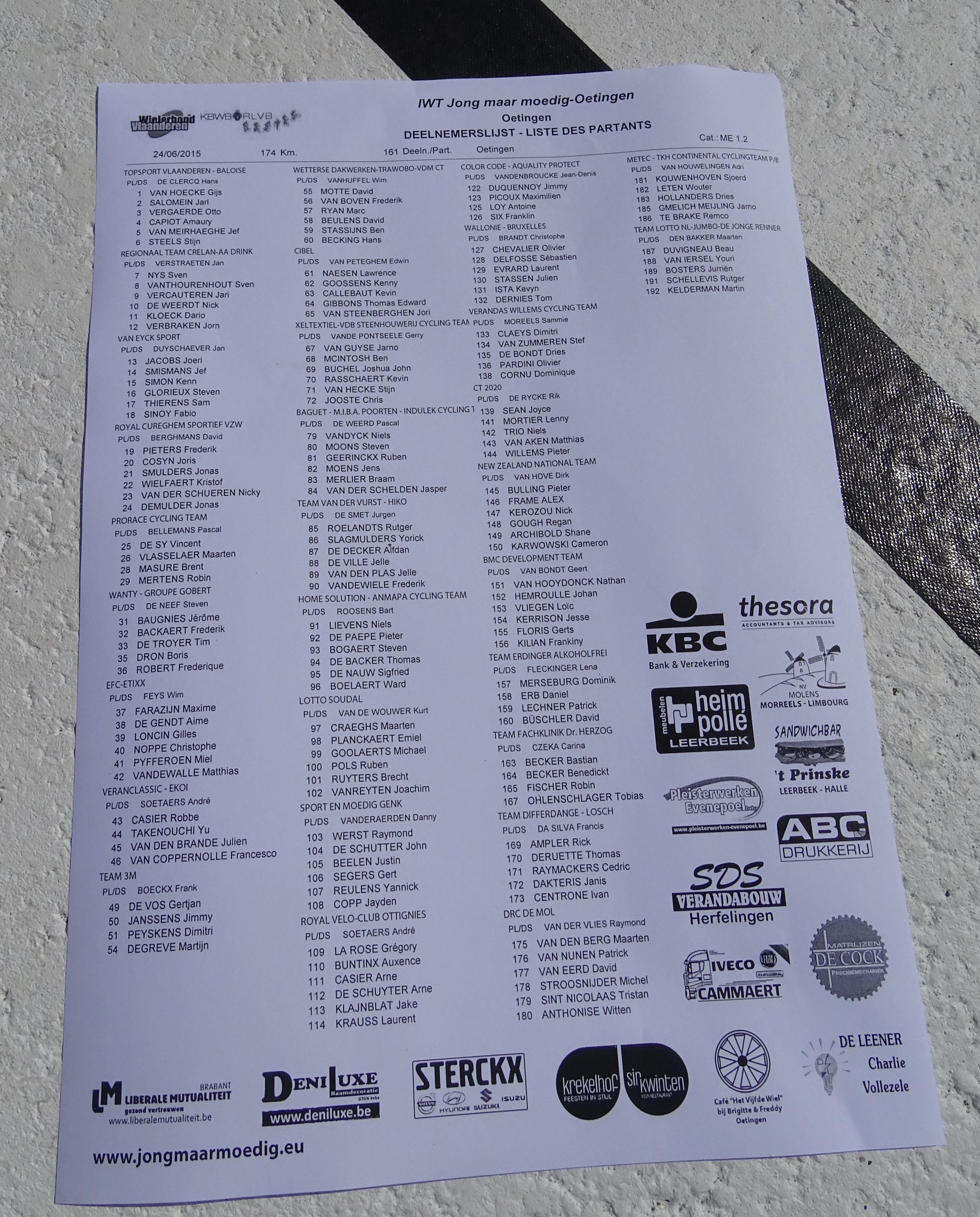 Reportage réalisé le mercredi 24 juin à l'occasion du départ et de l'arrivée de l'Internationale Wielertrofee Jong Maar Moedig 2015 à Oetingen (Gooik), Belgique.